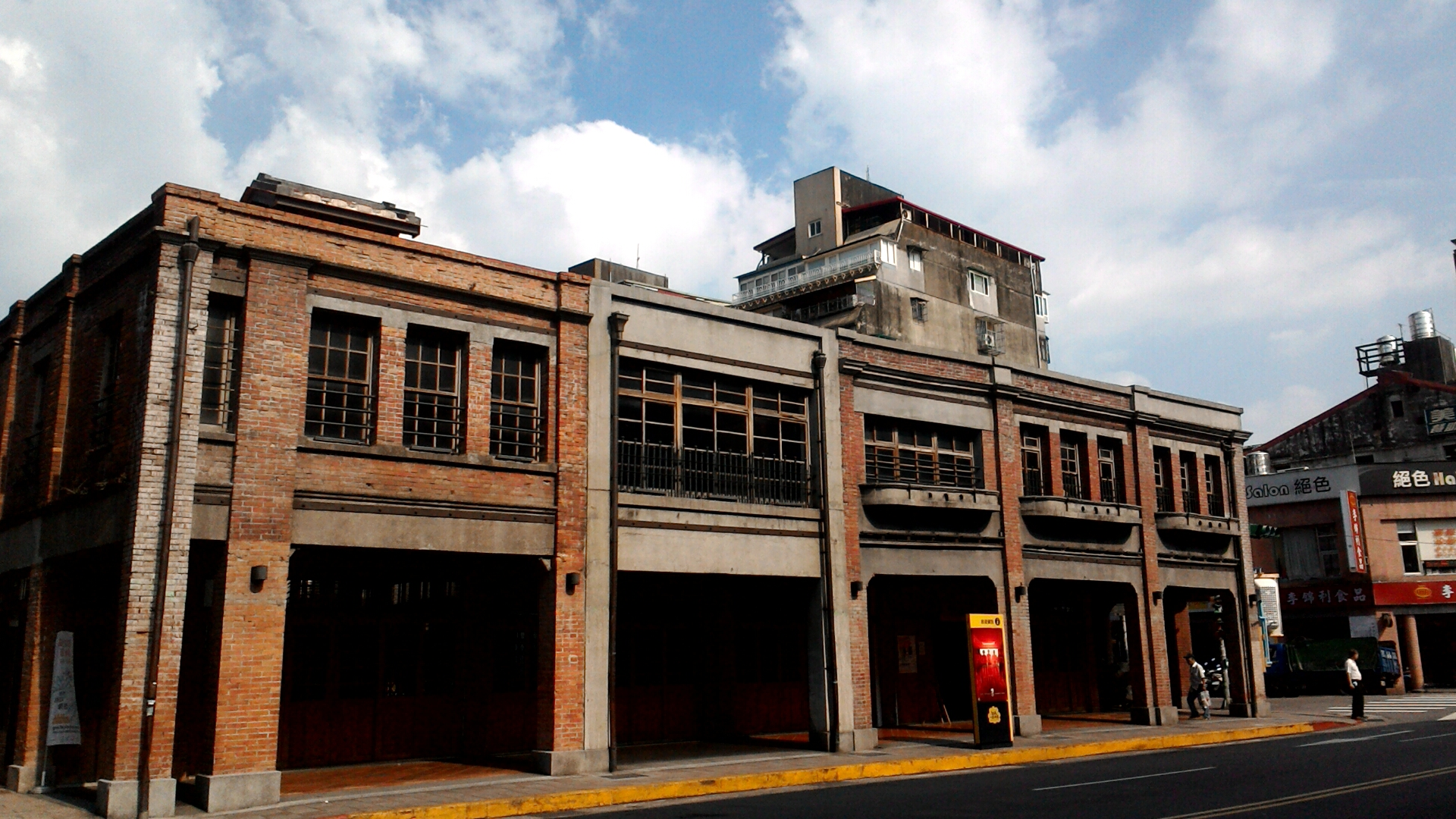 剝皮寮歷史建築群位於康定路旁的街屋,台北市萬華區龍山次分區福音里